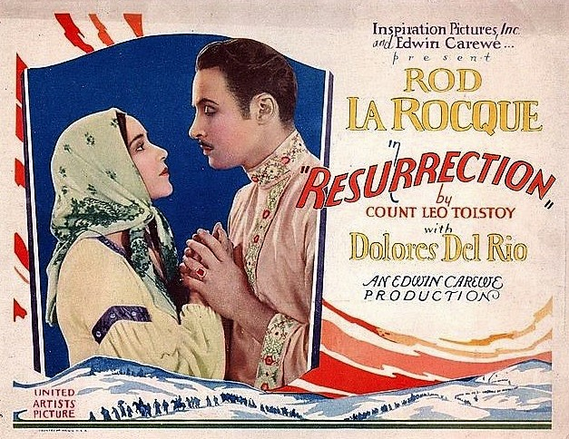 Poster del film Resurrection